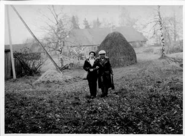 Õppesõit Mulgi murde alale. Vasakult: Ellen Uuspõld, Paula Palmeos (71).